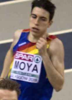 EKI10404 800m reeksen kupers